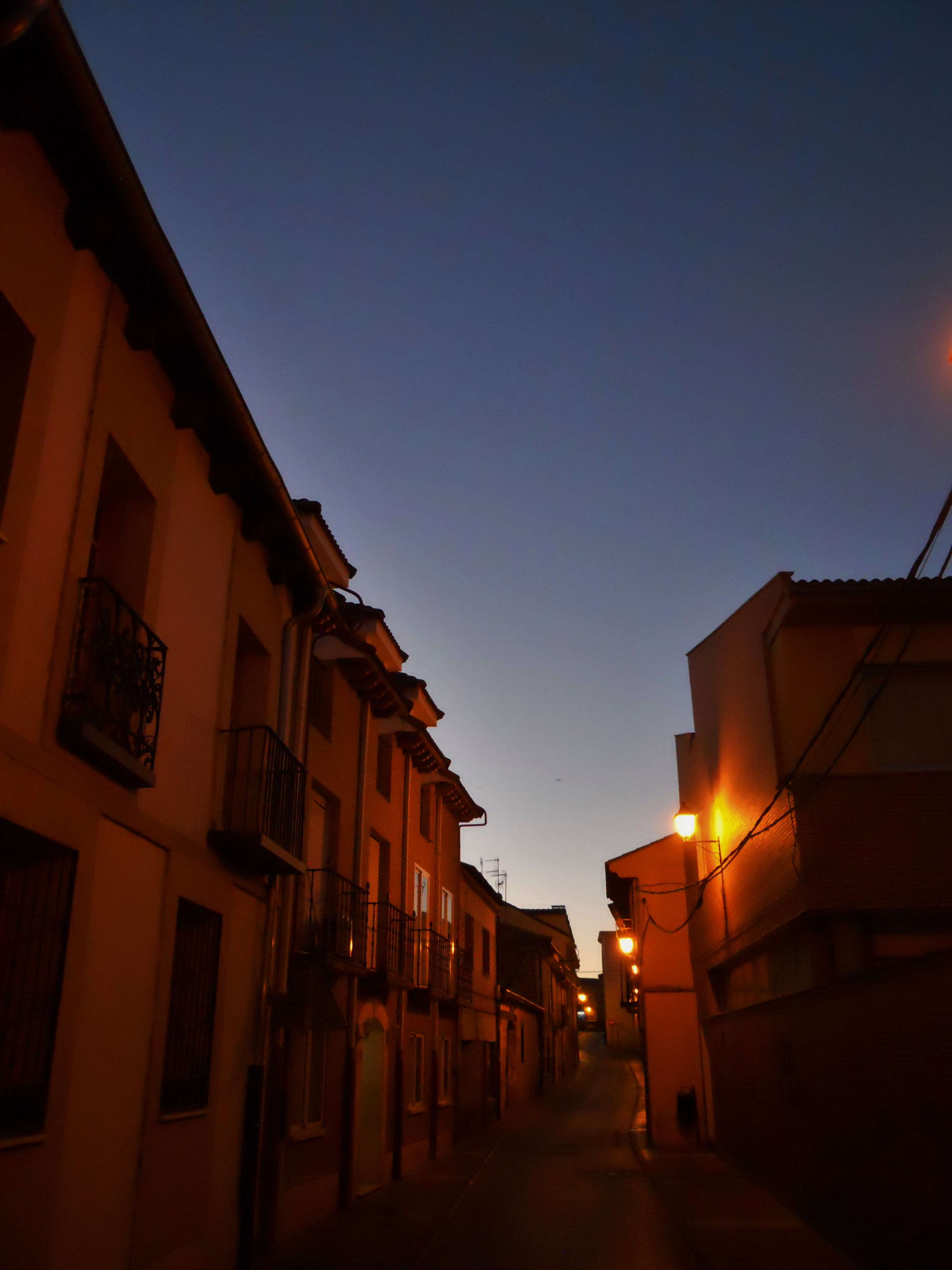 Centro histórico de Tudela